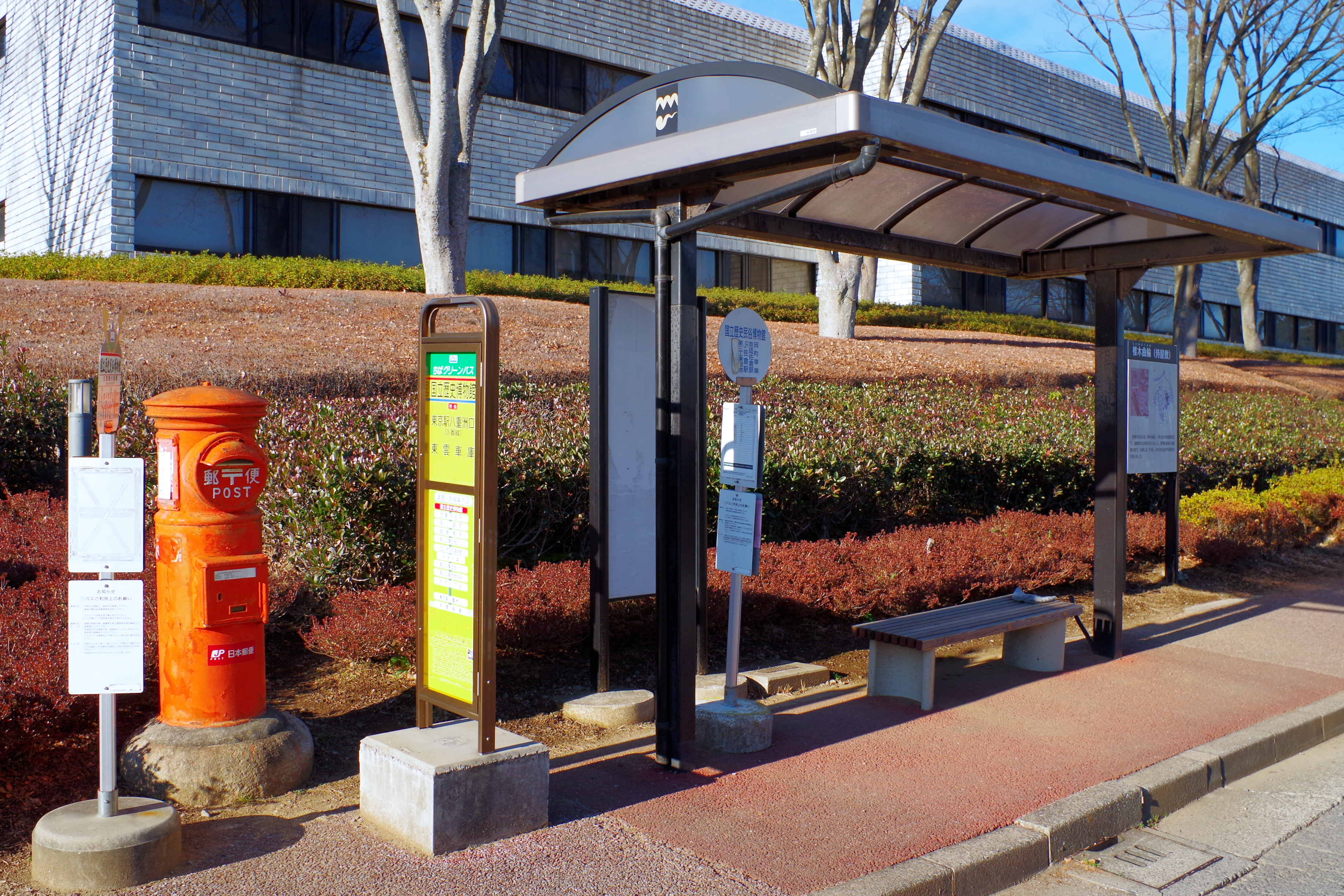 国立歴史民俗博物館バス停 2015.1.02